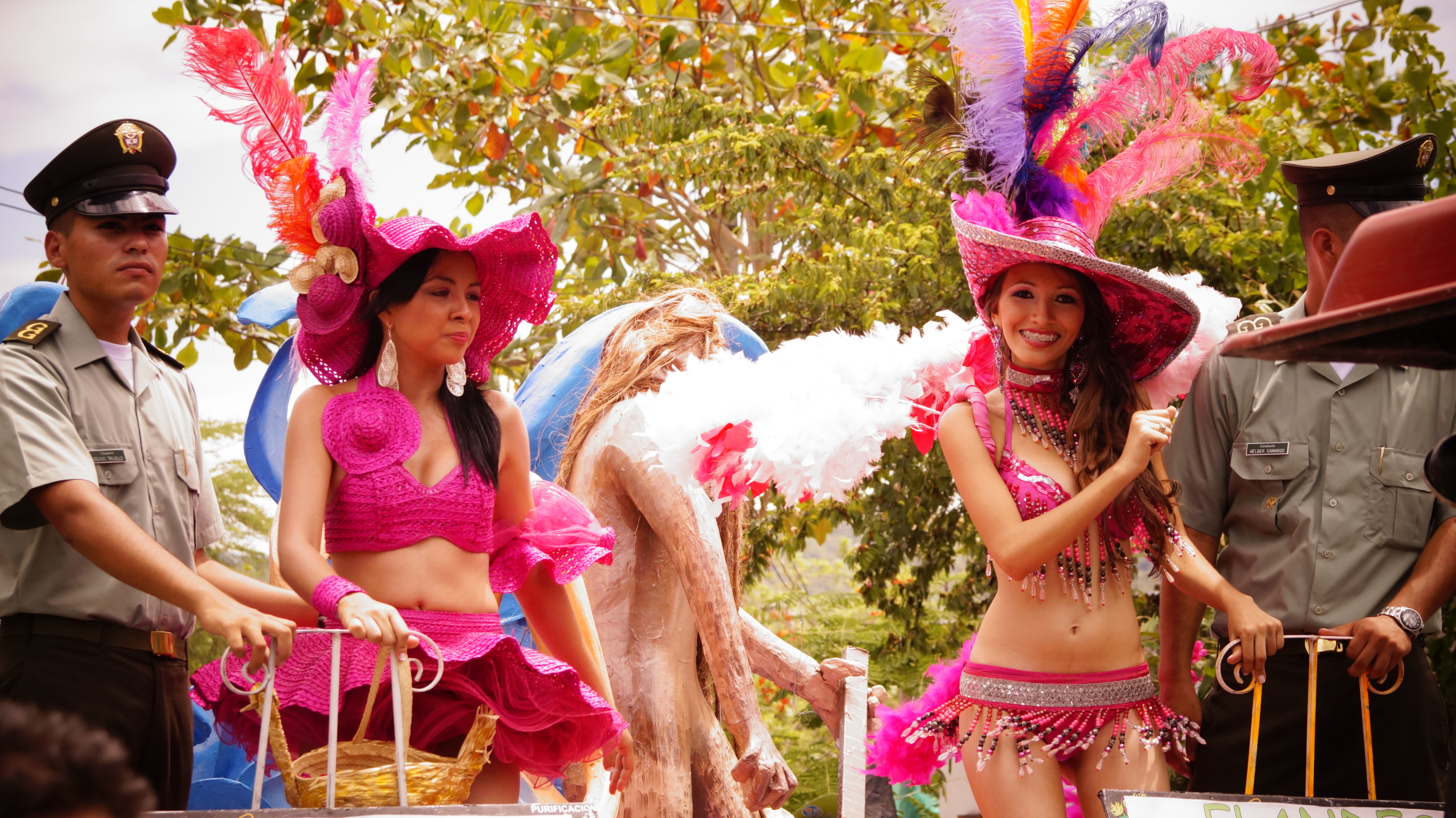 Recorrido por la ciuedad de coello en las corrosas